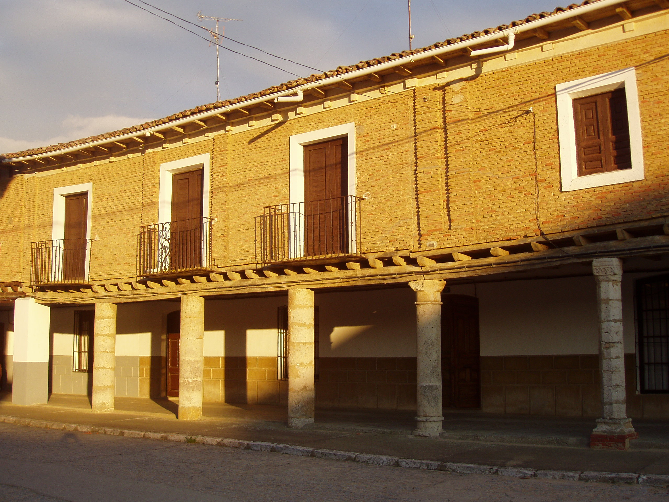 Casas de ladrillo sobre soportales (en este caso de piedra). Las calles asoportaledas son tradicionales en las villas de Castilla y León. Villalón de Campos (Tierra de Campos), provincia de Valladolid, España.